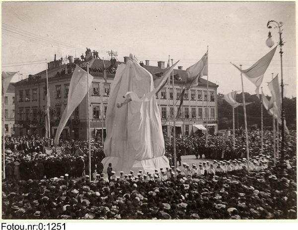 Avtäckningen av Carl IX:s staty i Göteborg 1904.